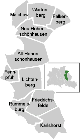 Ortsteile im Bezirk Lichtenberg von Berlin